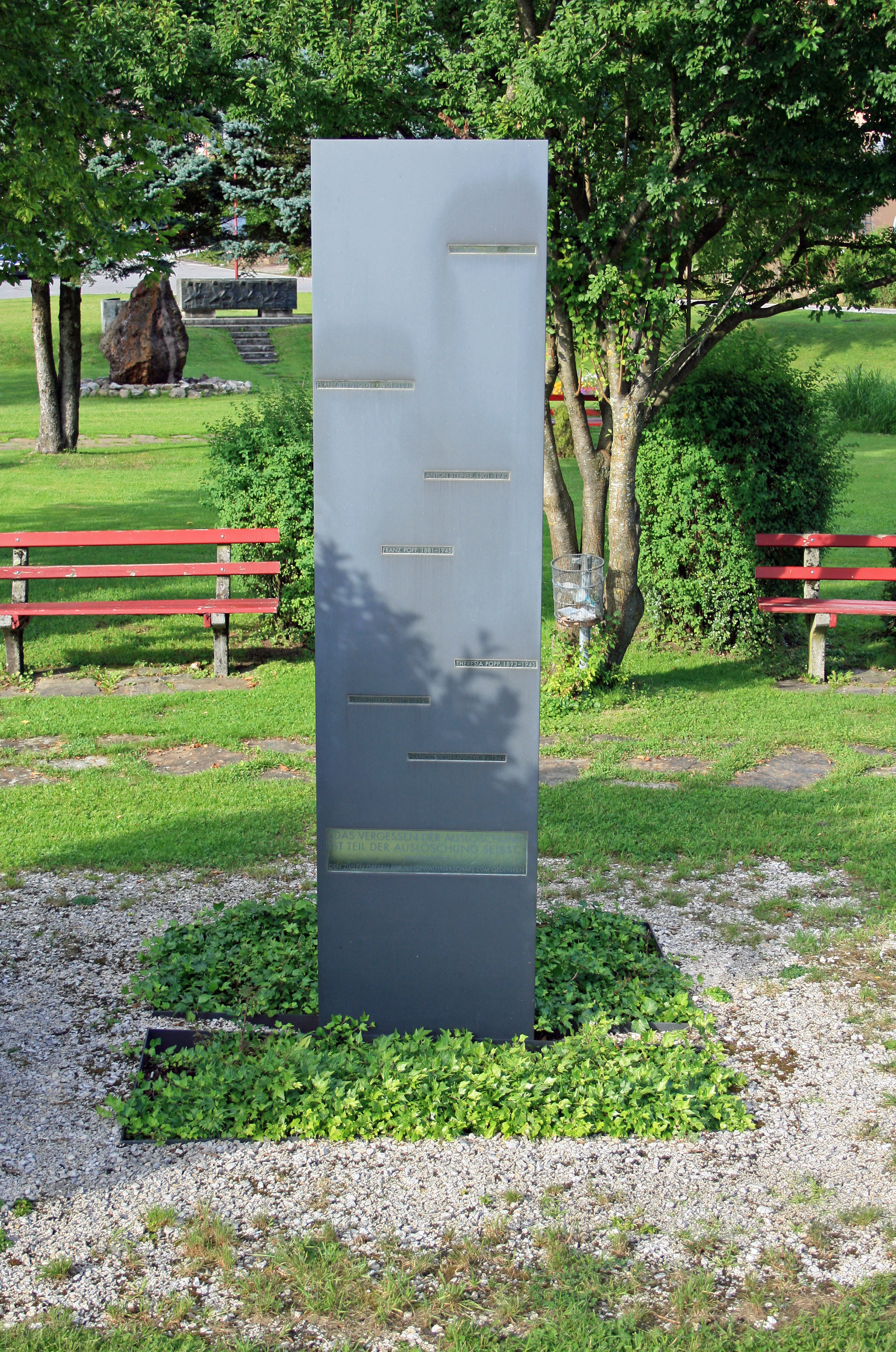 Das Mollner Mahnmal für die zivilen Opfer des Nationalsozialismus im früheren Gemeindepark (etwa bis Ende 2011). Seit Ende 2012 befindet es sich etwas versetzt beim neu errichteten Bürger- und Musikzentrum. Gestalter ist Herbert Friedl[1]